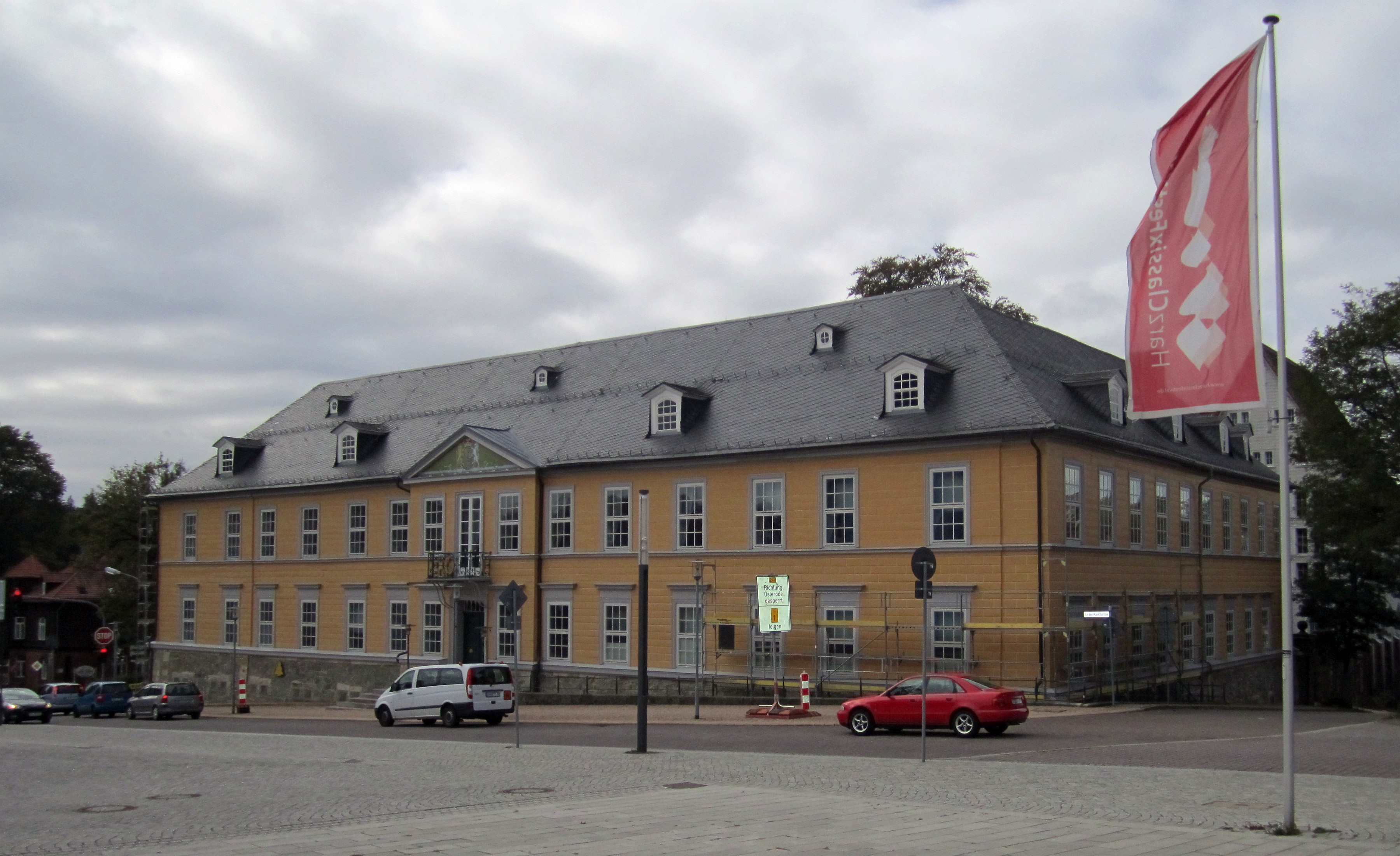 Oberbergamt in Clausthal, Gemeinde Clausthal-Zellerfeld, Niedersachsen, Deutschland.